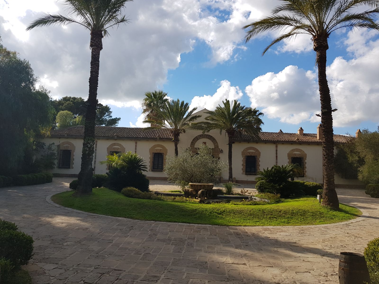 Si trova in un paese in provincia di Trapani